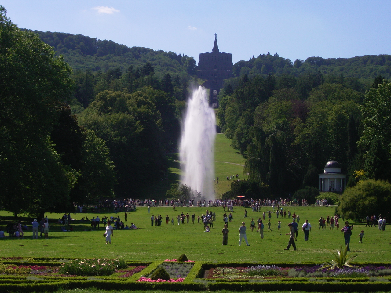 Beschreibung: Bergpark Wilhelmshöhe Grosse Fontäne, 2005 Quelle: selbst photographiert Photograph: Hafenbar 18:20, 10. Jul 2005 Hafenbar 1280 x 960 (690459 Byte)